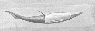 Heterostraci (genus Pteraspis?)